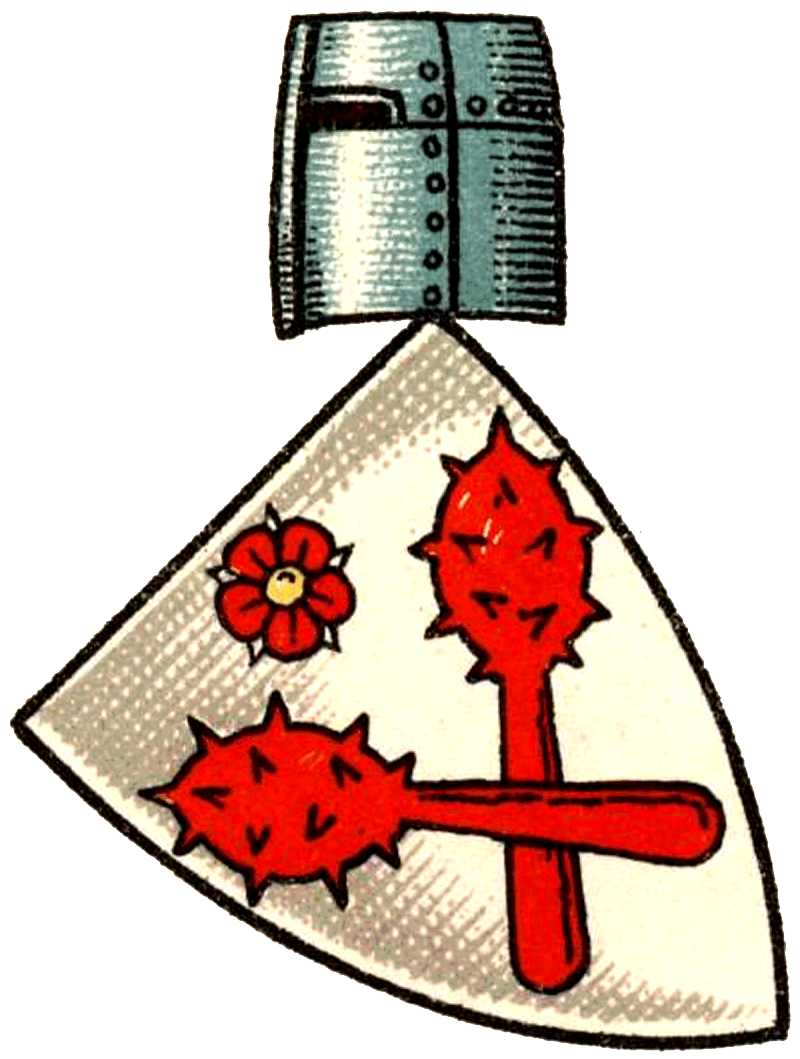 Wappen der Holzhausen gen. Bercull (Berkule)